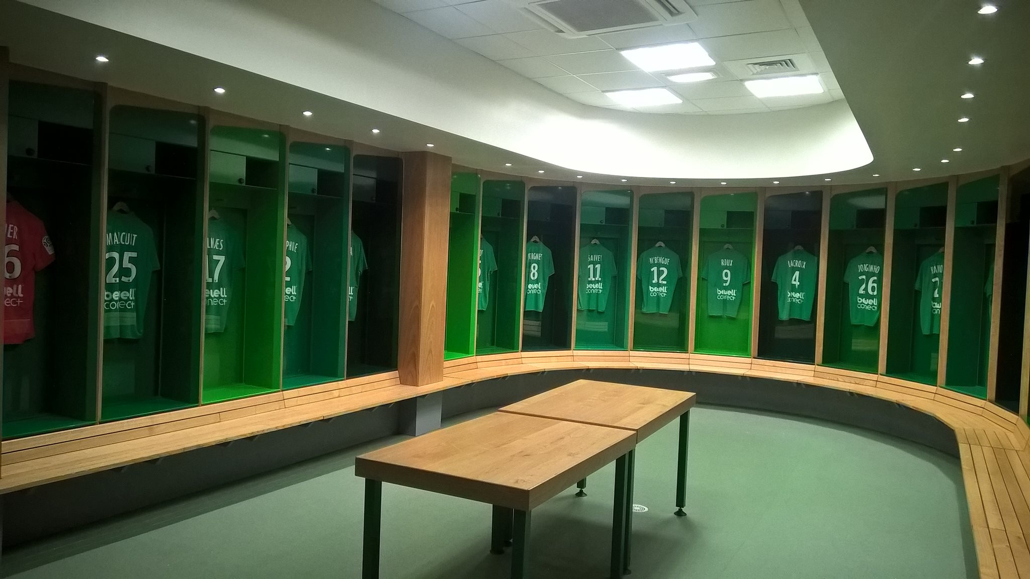 Le vestiaire des Verts rénové en 2017.